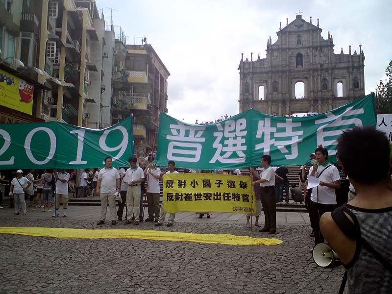 2019普選澳門特首